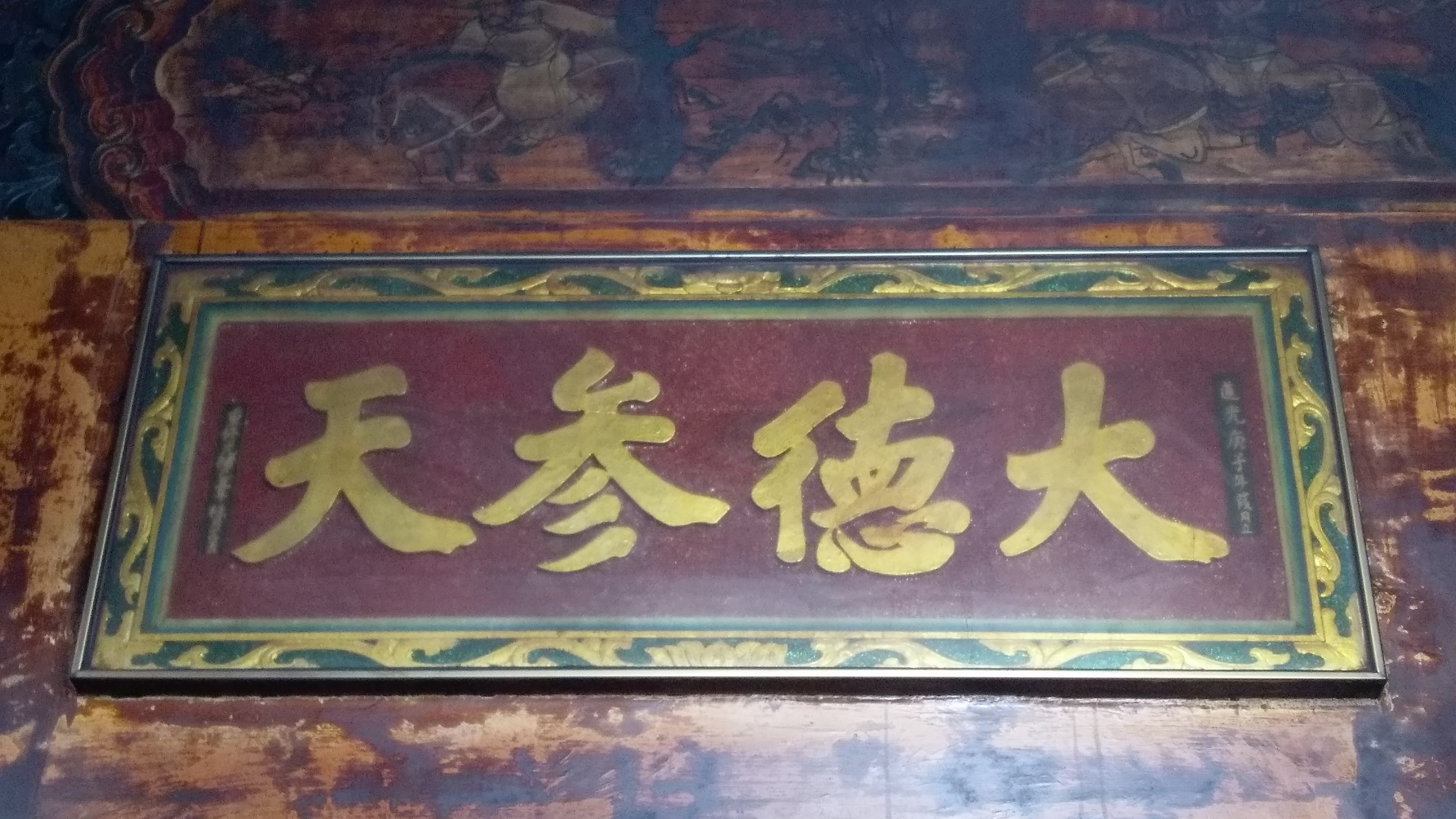 中文（台灣）: 大清道光20年（公元1840年）匾額「大德參天」